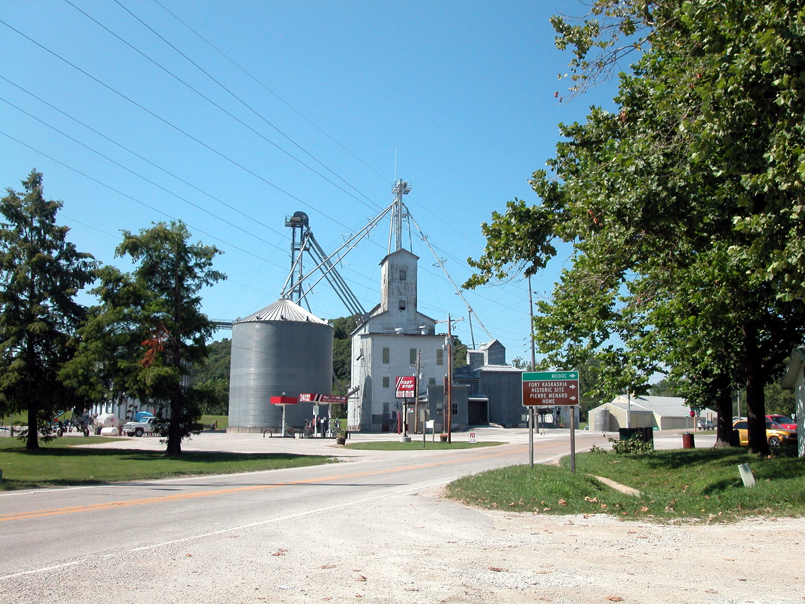 Grain elevator in Prairie du Rocher, Illinois.